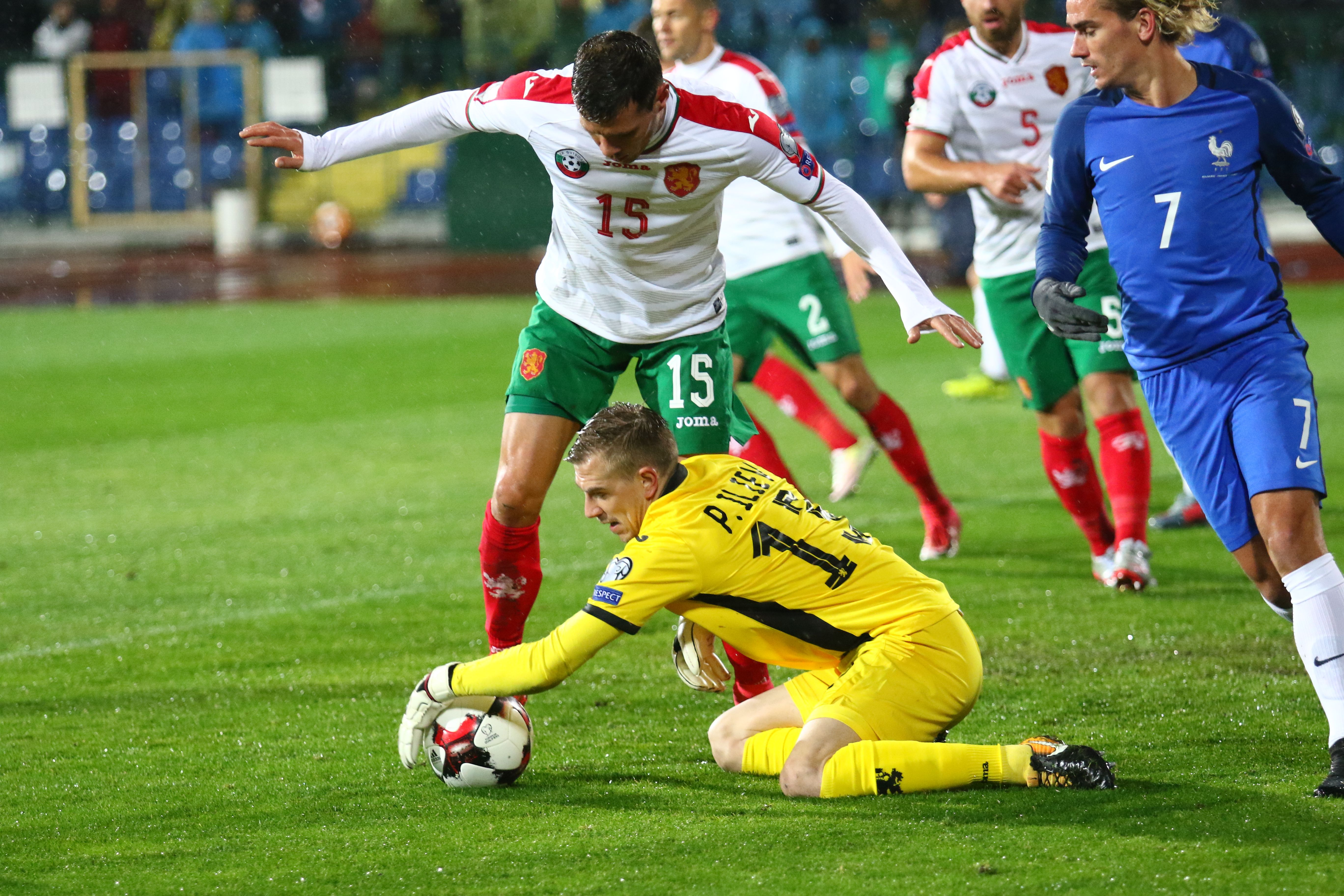 Момент от двубоя България - Франция, стадион "Васил Левски", 7-10-2017